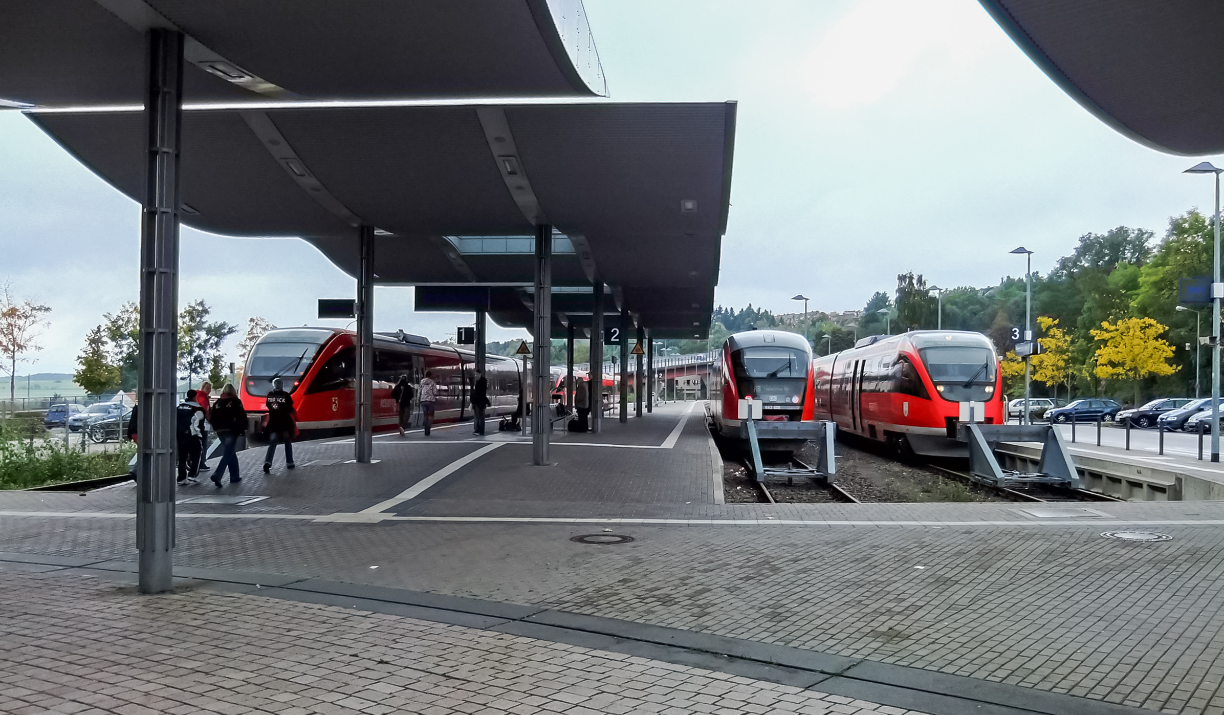 Pirmasens Hauptbahnhof / Main Station